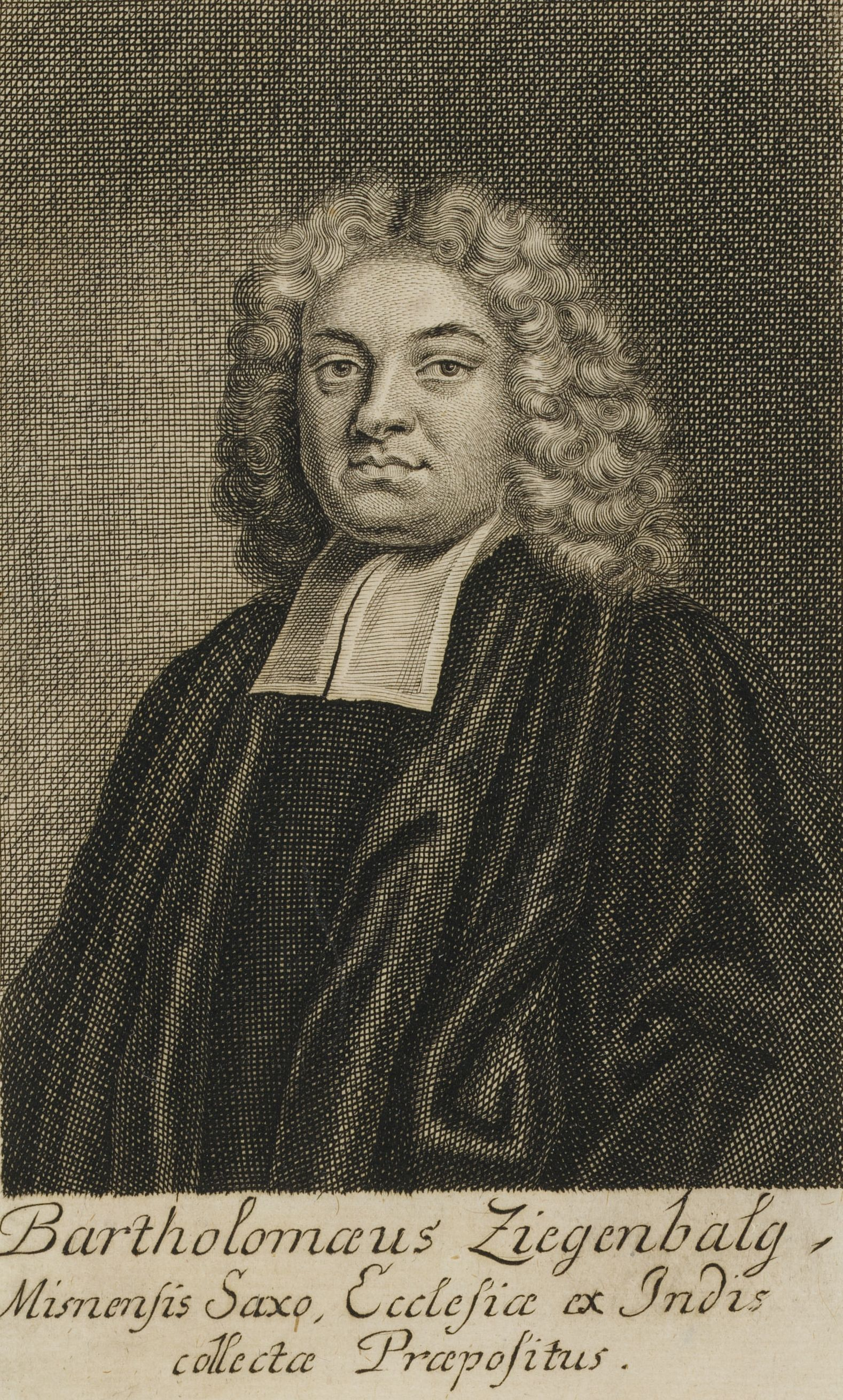 Bartholomaeus Ziegenbalg, Misnensis Saxo. Ecclesis ex Indis collectae Prapositus